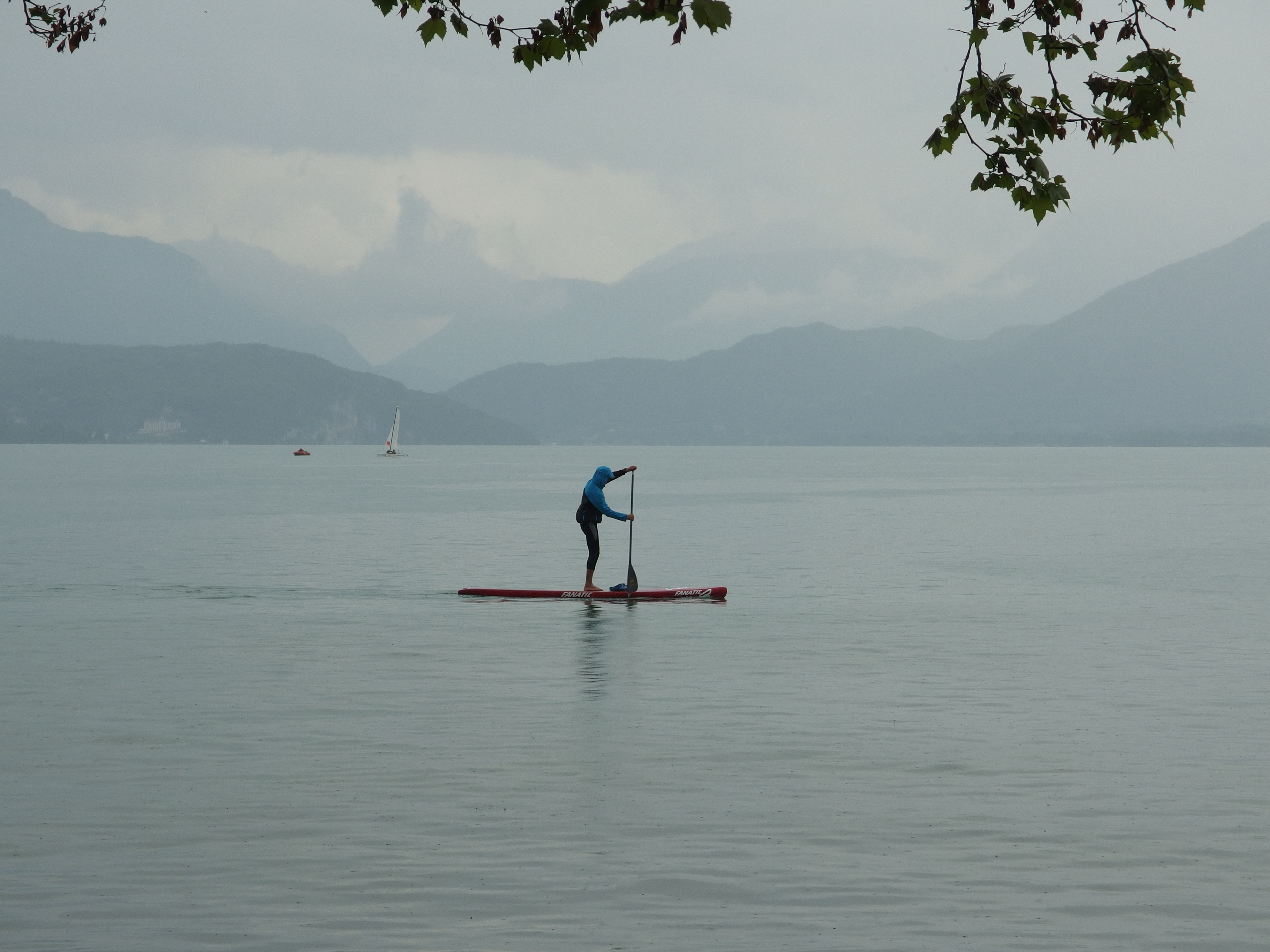 Lake Annecy